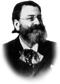 Photographie d'Édouard Drumont. Photographe inconnu, mais la photo a plus de 70 ans (Édouard Drumont étant mort en 1917). Par ailleurs, elle n'est pas l'exact originale, l'ayant retouché.